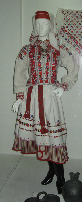 Женский праздничный наряд, Галиция Женский праздничный наряд, Галиция, музей этнографии во Львове